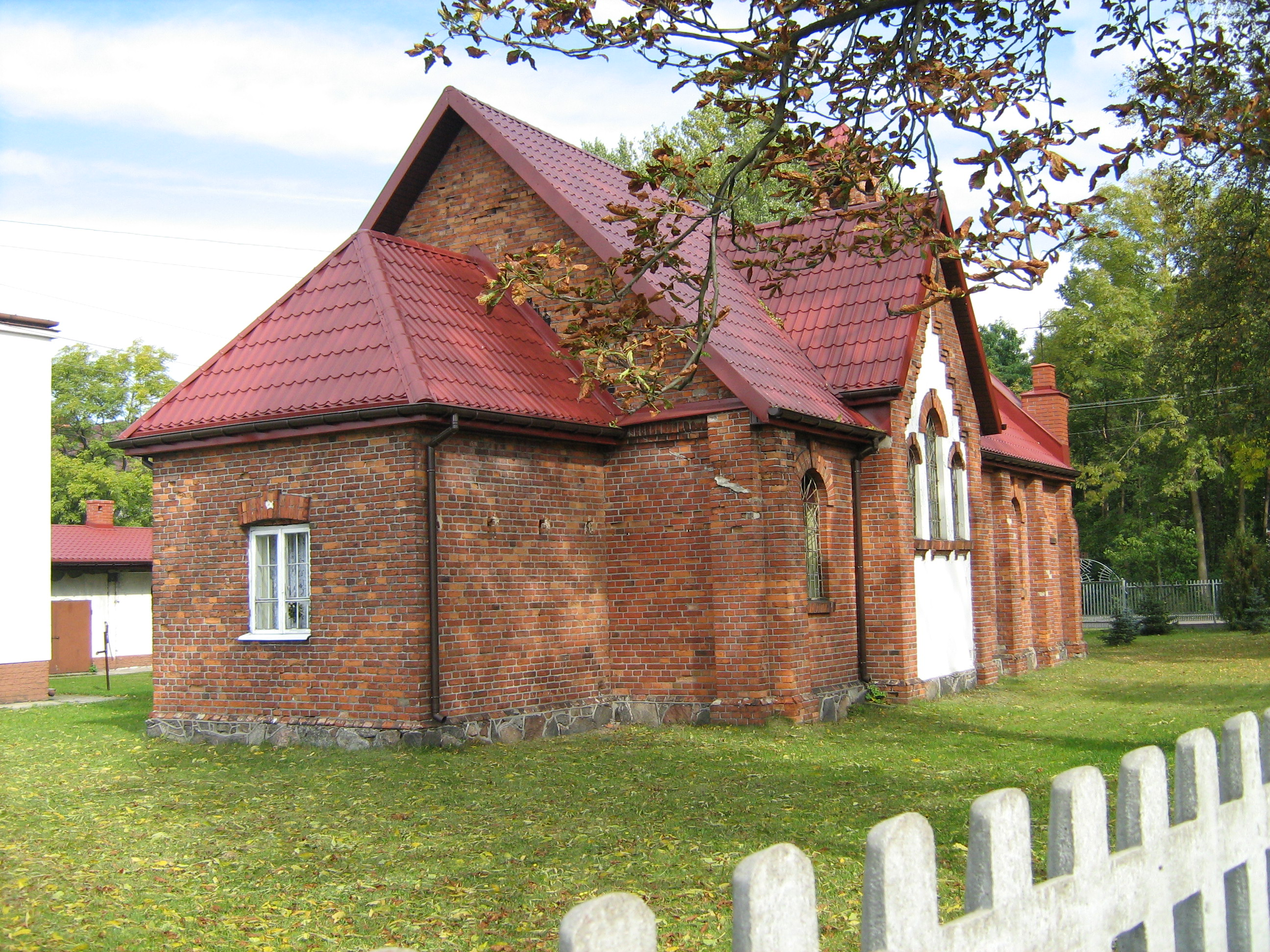 Catholic Mariavite Church in Dluga Koscielna (Poland) Kościół Katolicki Mariawitów w Długiej Kościelnej